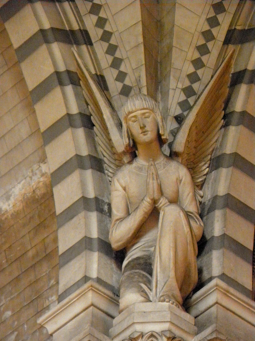 Intérieur de l'église Saint-Sacrement de Lyon (69003). Ange à la naissance des voûtes.